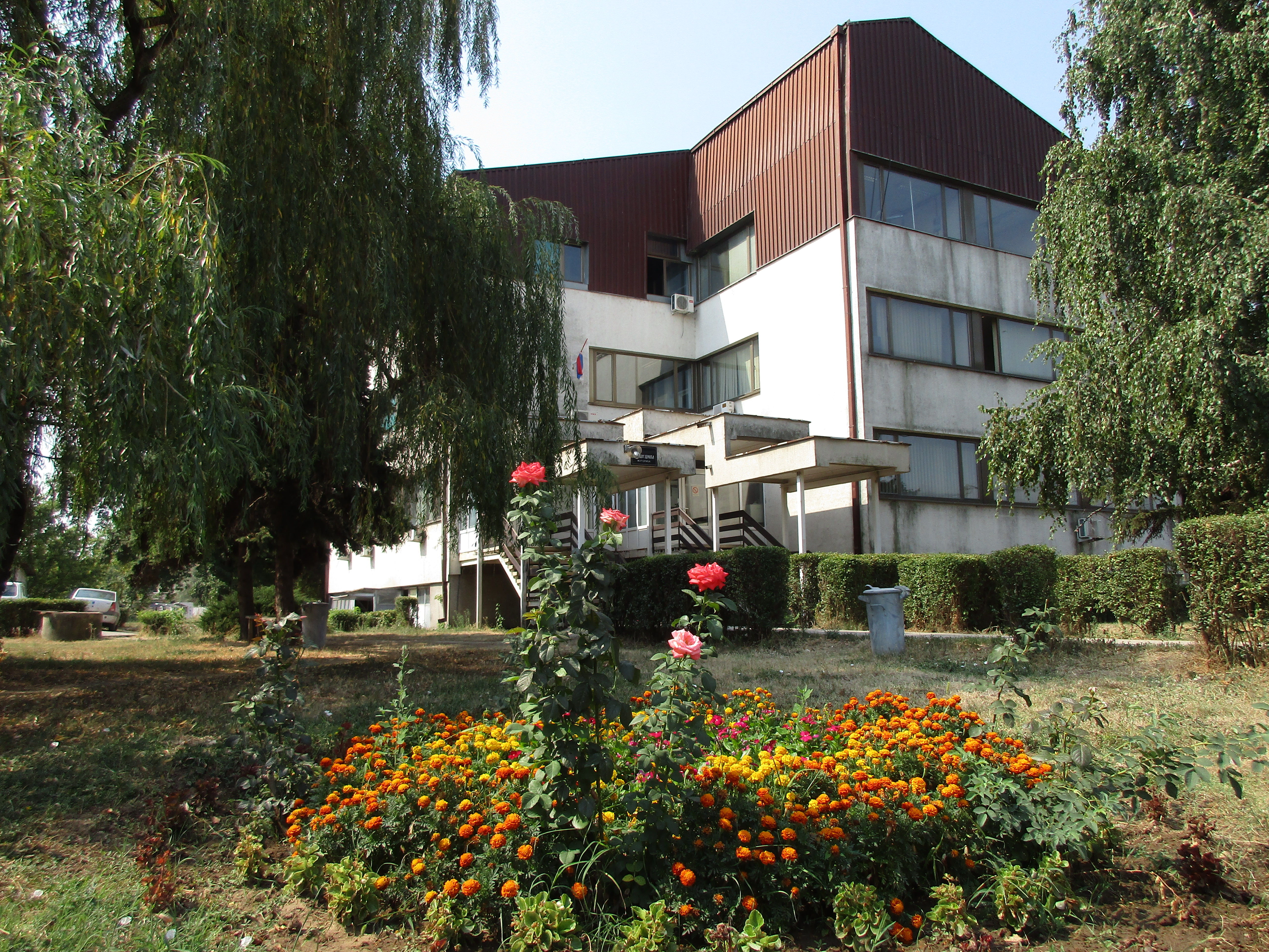 Srpski (latinica): Dom zdravlja, Žitorađa